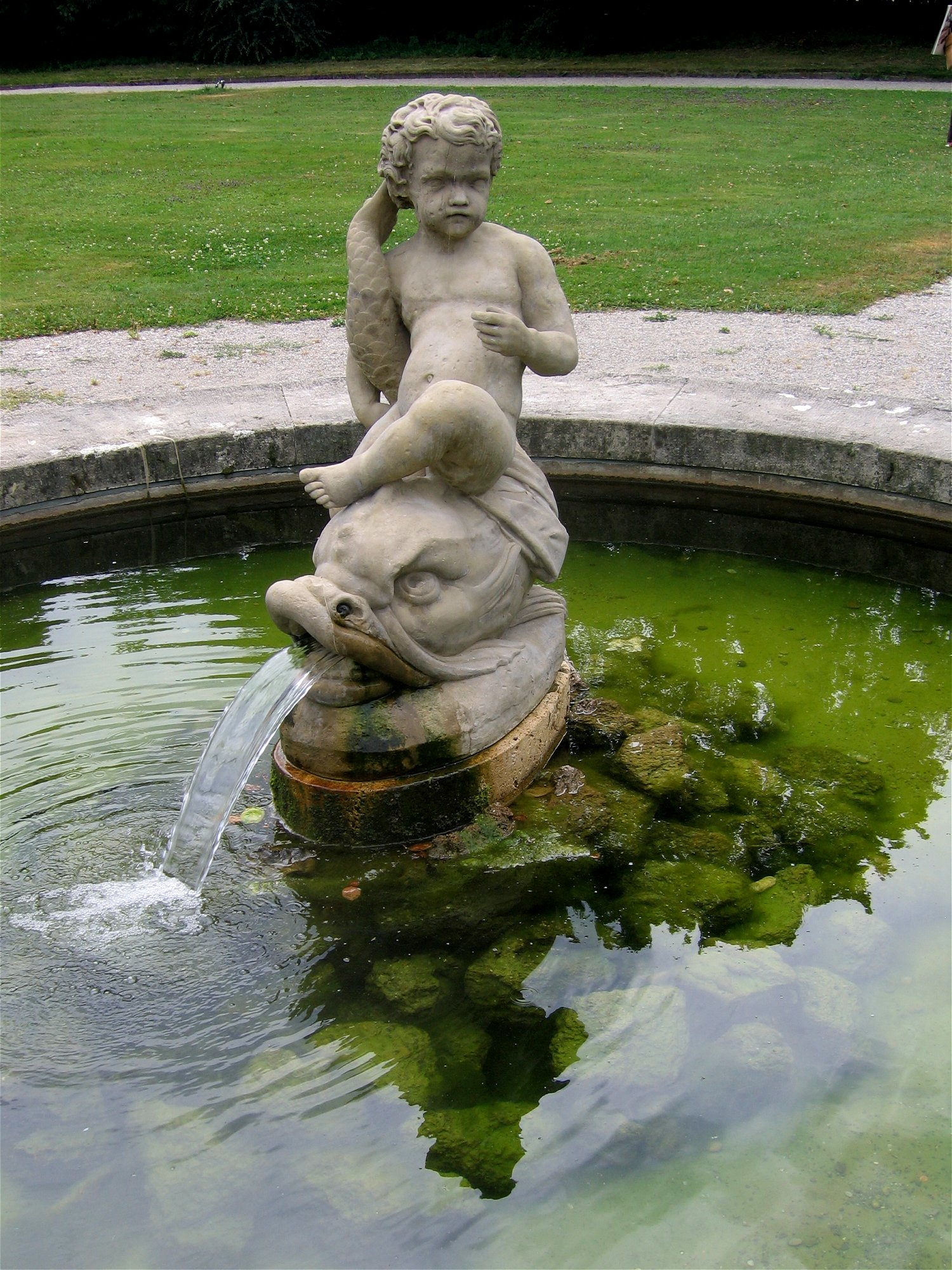 Brunnenfigur im Schlosspark Nymphenburg, München, von Johann Nepomuk Haller nach einem Entwurf von Peter Lamine (1818), "Knabe auf einem Delphin reitend"